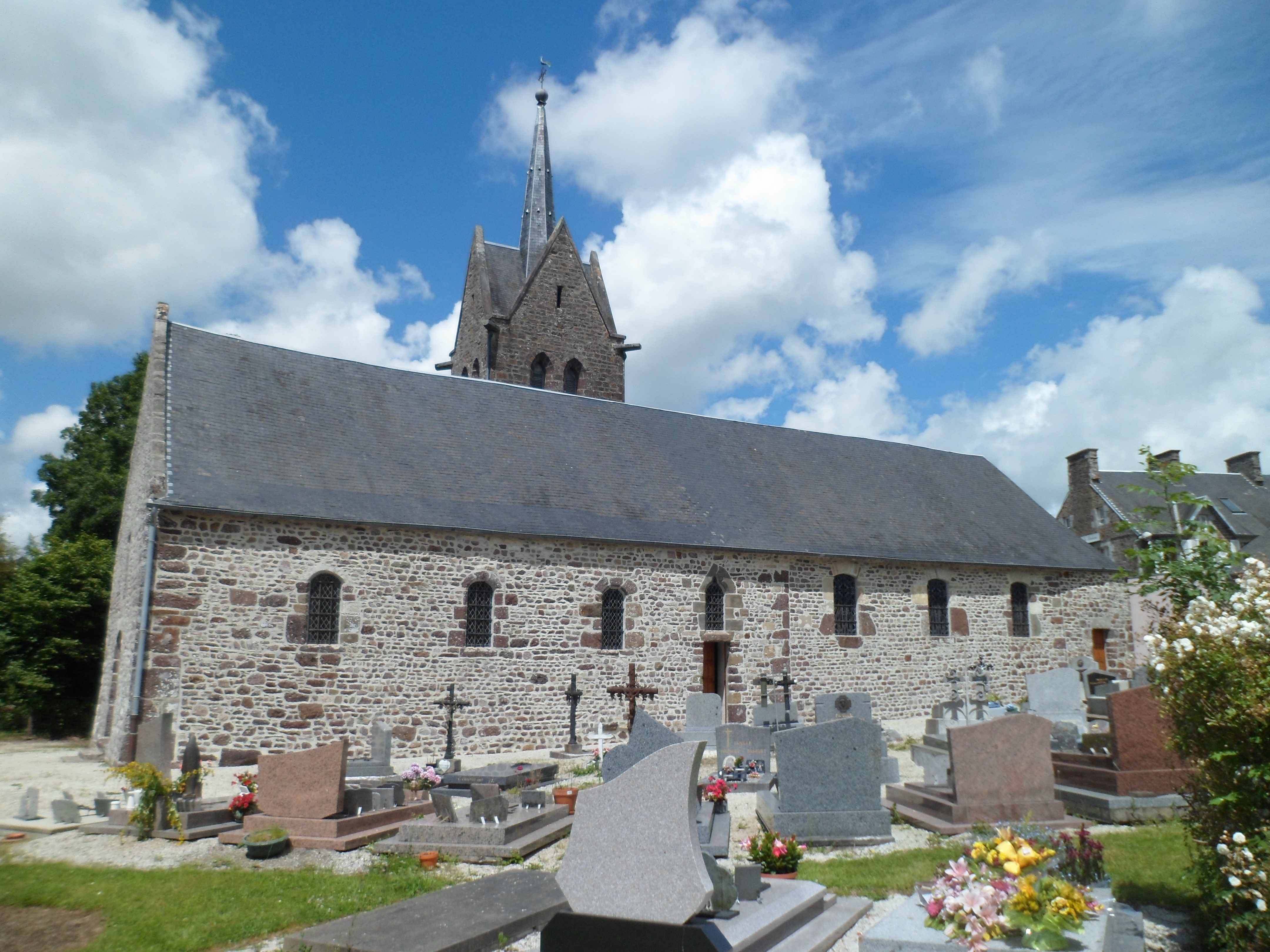 Église Saint-Pierre de La Baleine